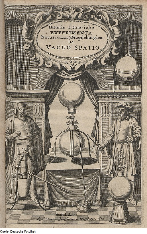 Original image description from the Deutsche Fotothek Physik & Vakuumtechnik & Luftdruck